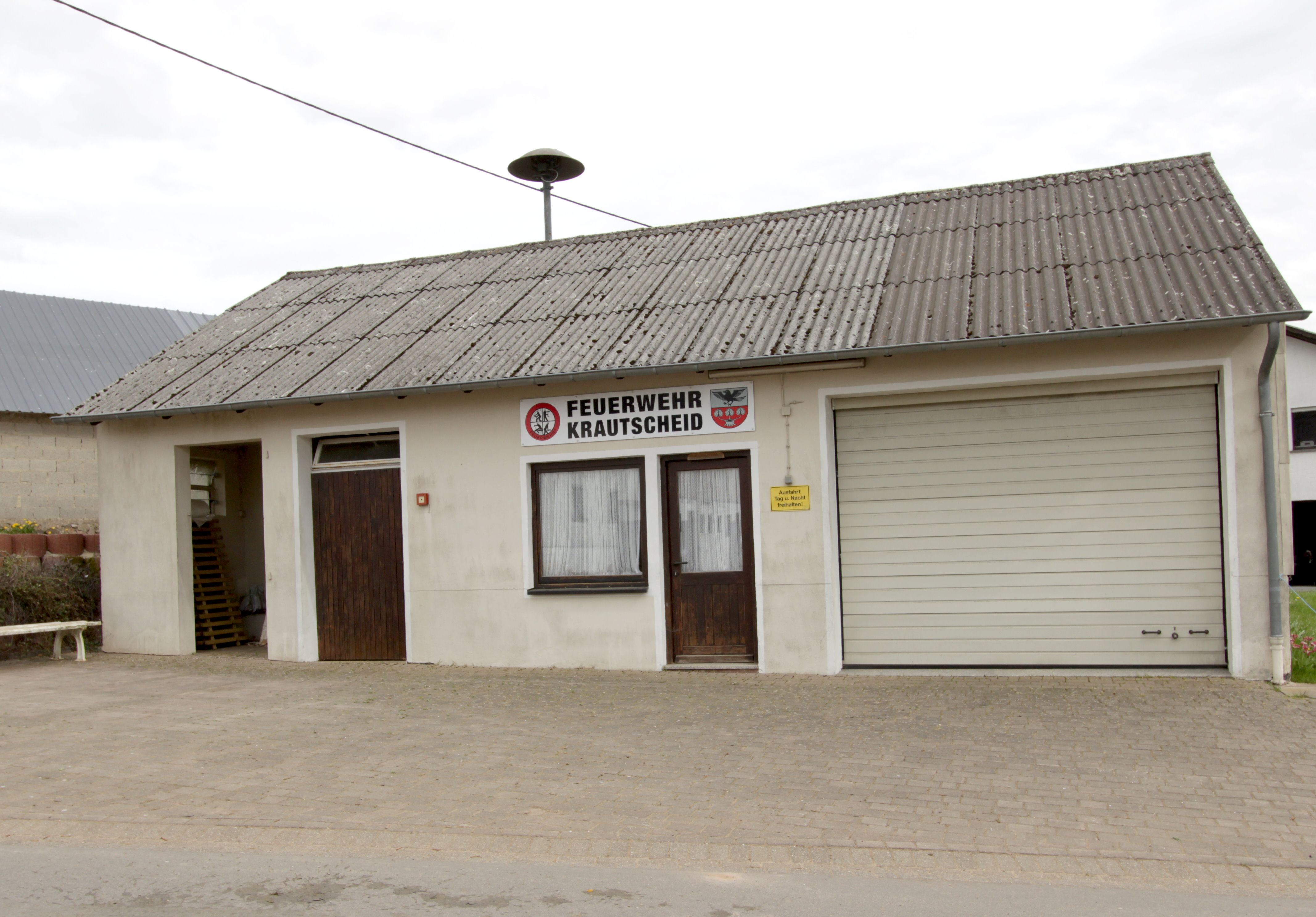 54673 Krautscheid, Dorfstraße 7. Gebäude der Freiwilligen Feuerwehr von Krautscheid. Aufnahme von 2018.